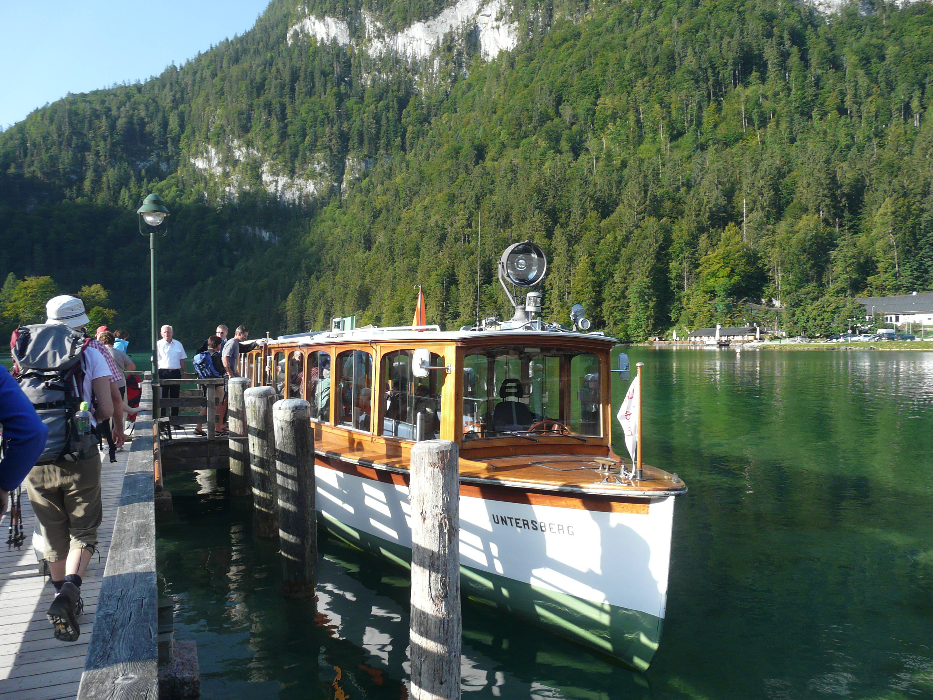 Die Untersberg am Anlegepier des Bootshafen von Schönau am Königssee